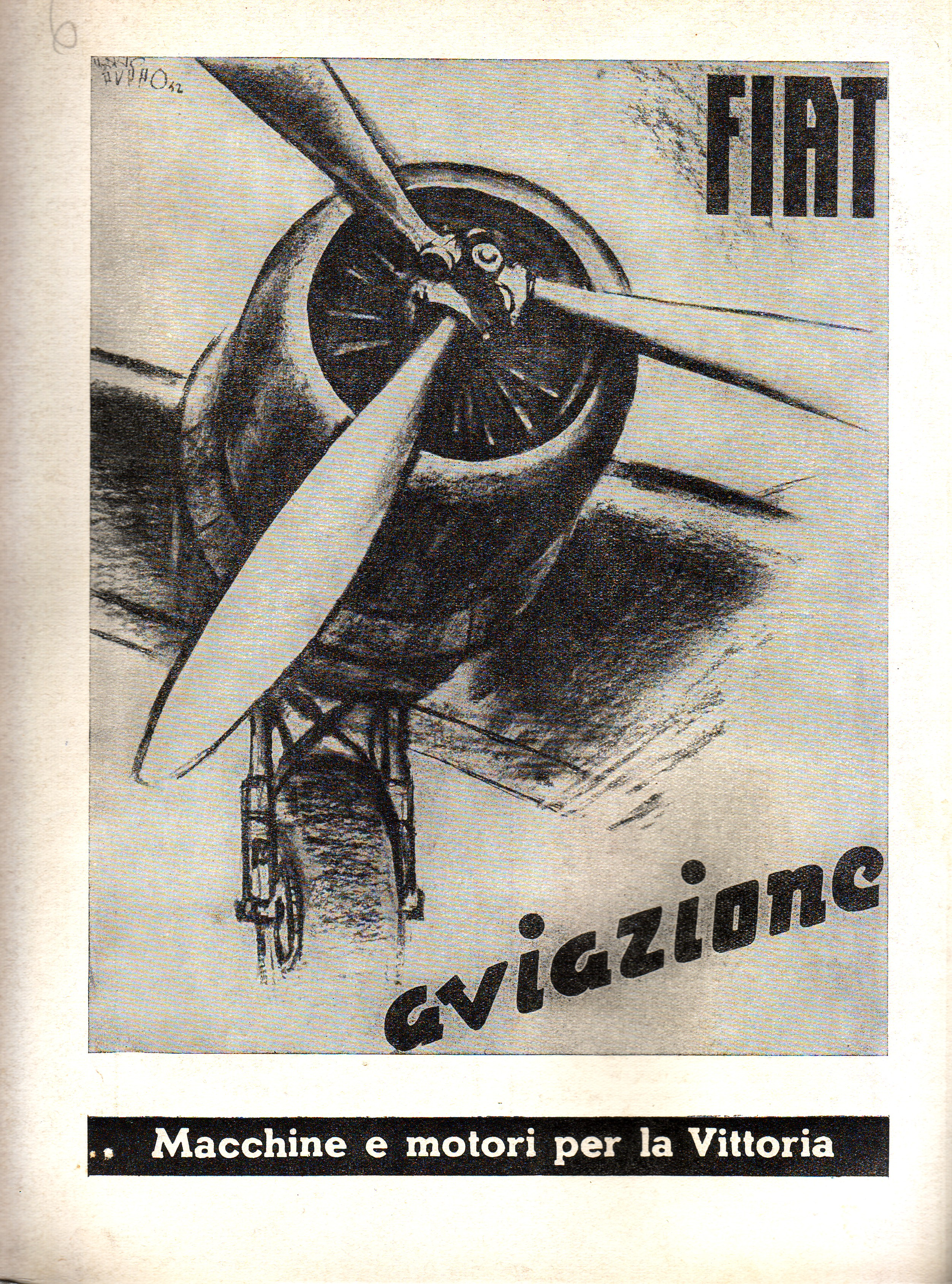 Pubblicità "FIAT aviazione. Macchine e motori per la Vittoria". Dalla rivista "Capitolium", agosto 1942.